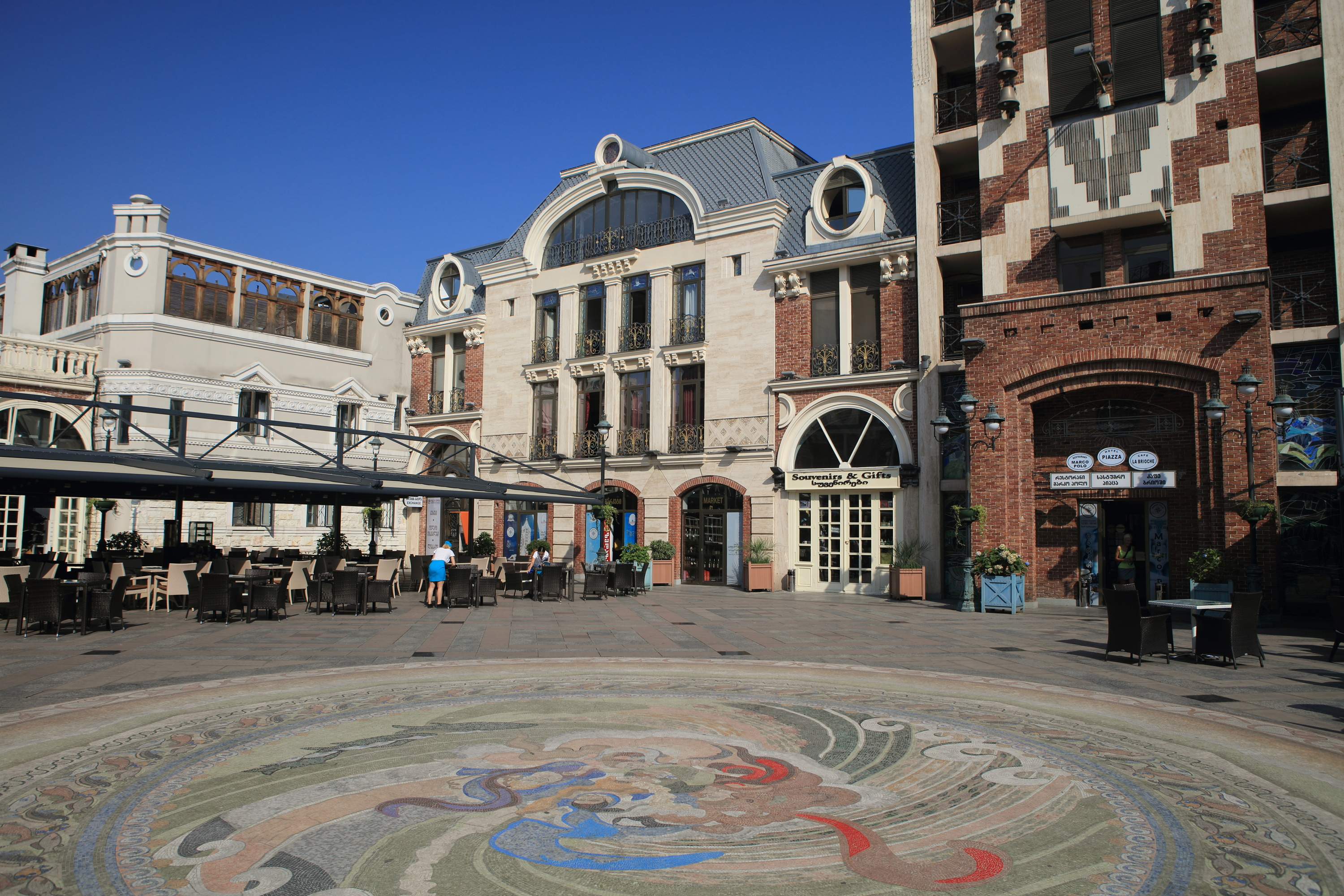 Batumi, střed města